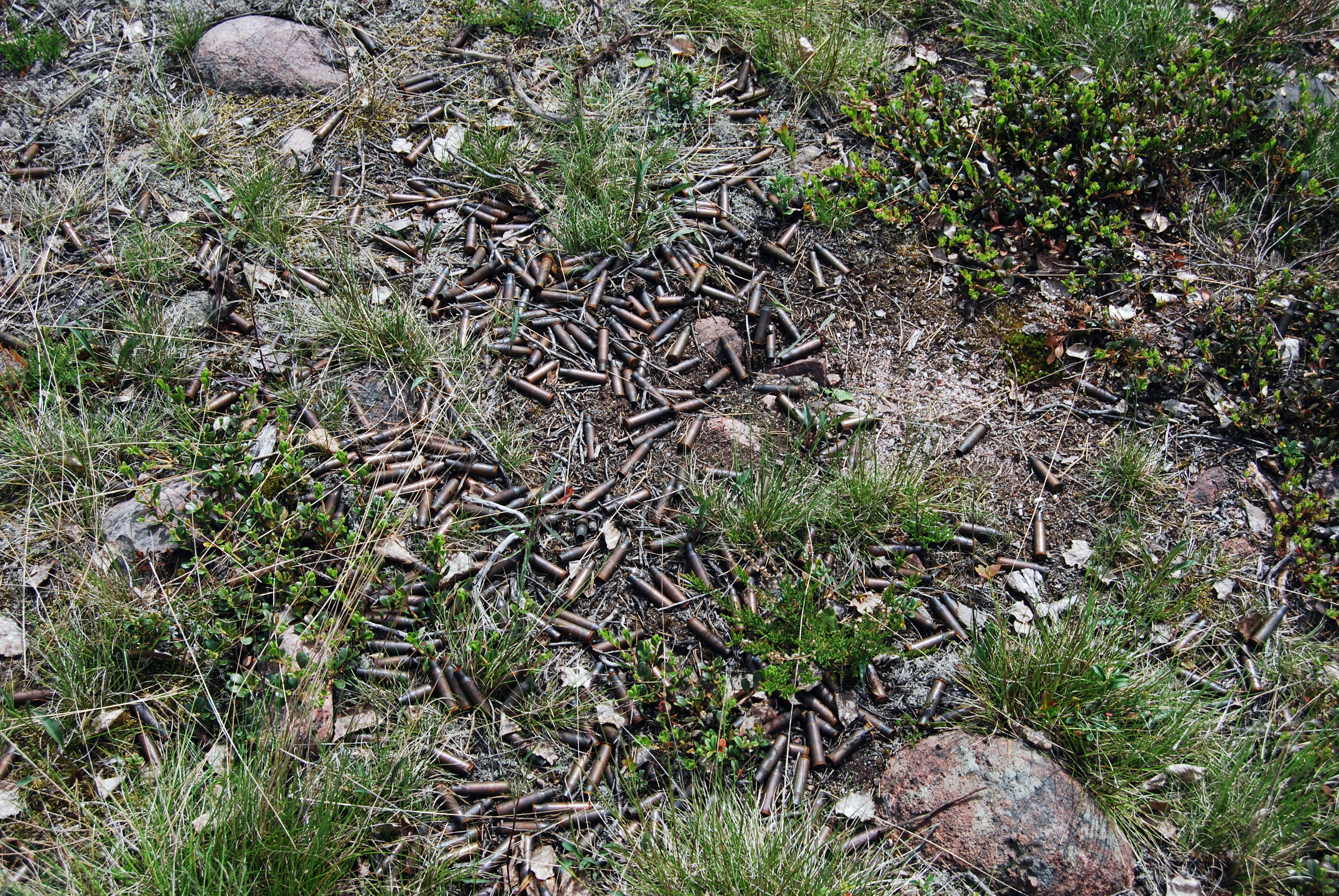 Ammusten hylsyjä maassa Säkylän varuskunnan alueella.